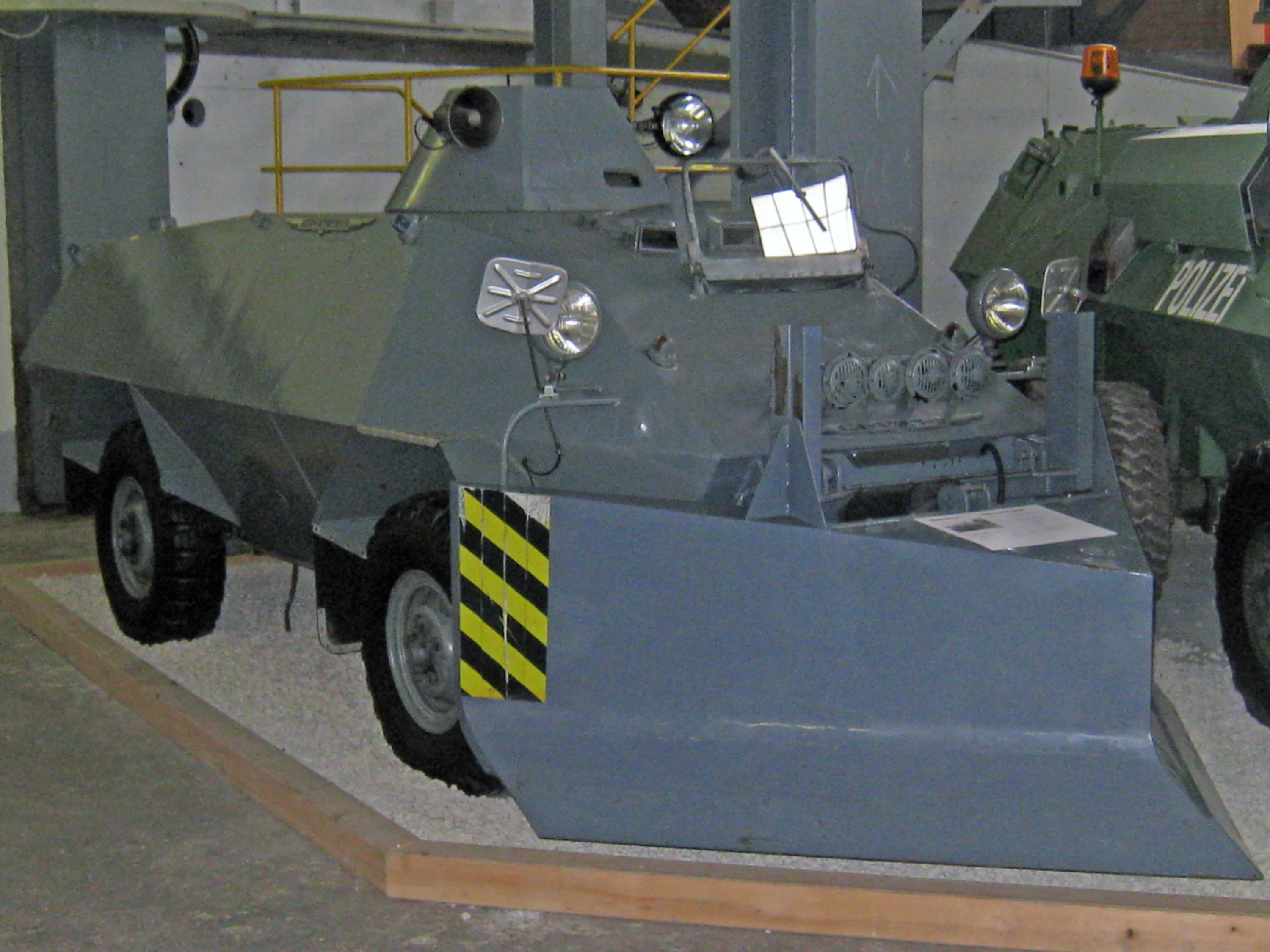 MOWAG Roland Polizei schräg